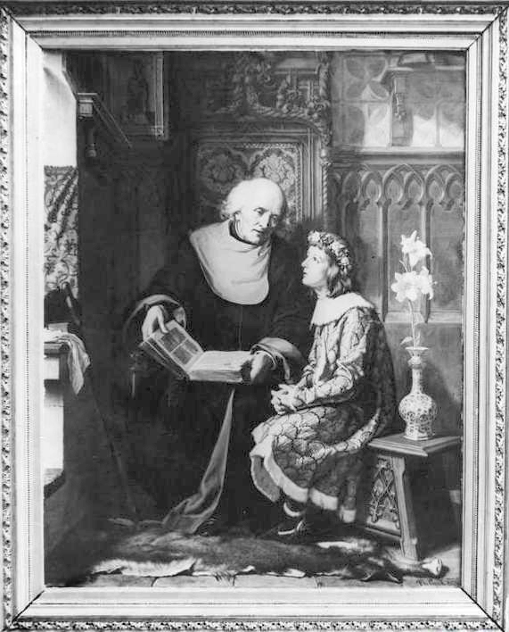 Florian Cynk. "Długosz uczący królewicza polskiego"